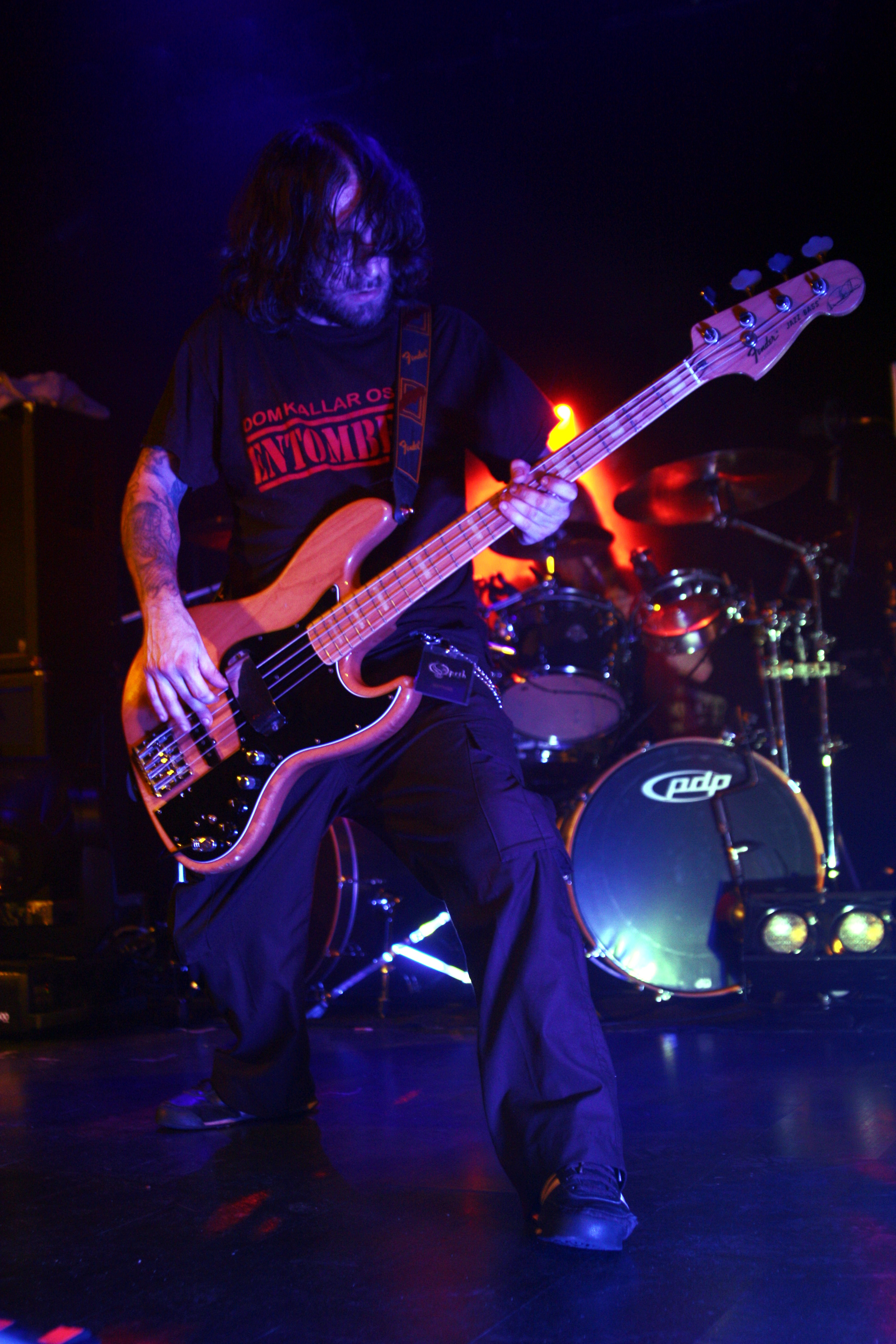 Martin Mendez en la Sala Apolo, Barcelona.